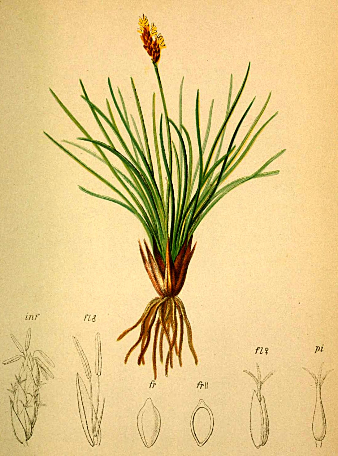 Kobresia caricina (Kobresia simpliciuscula)